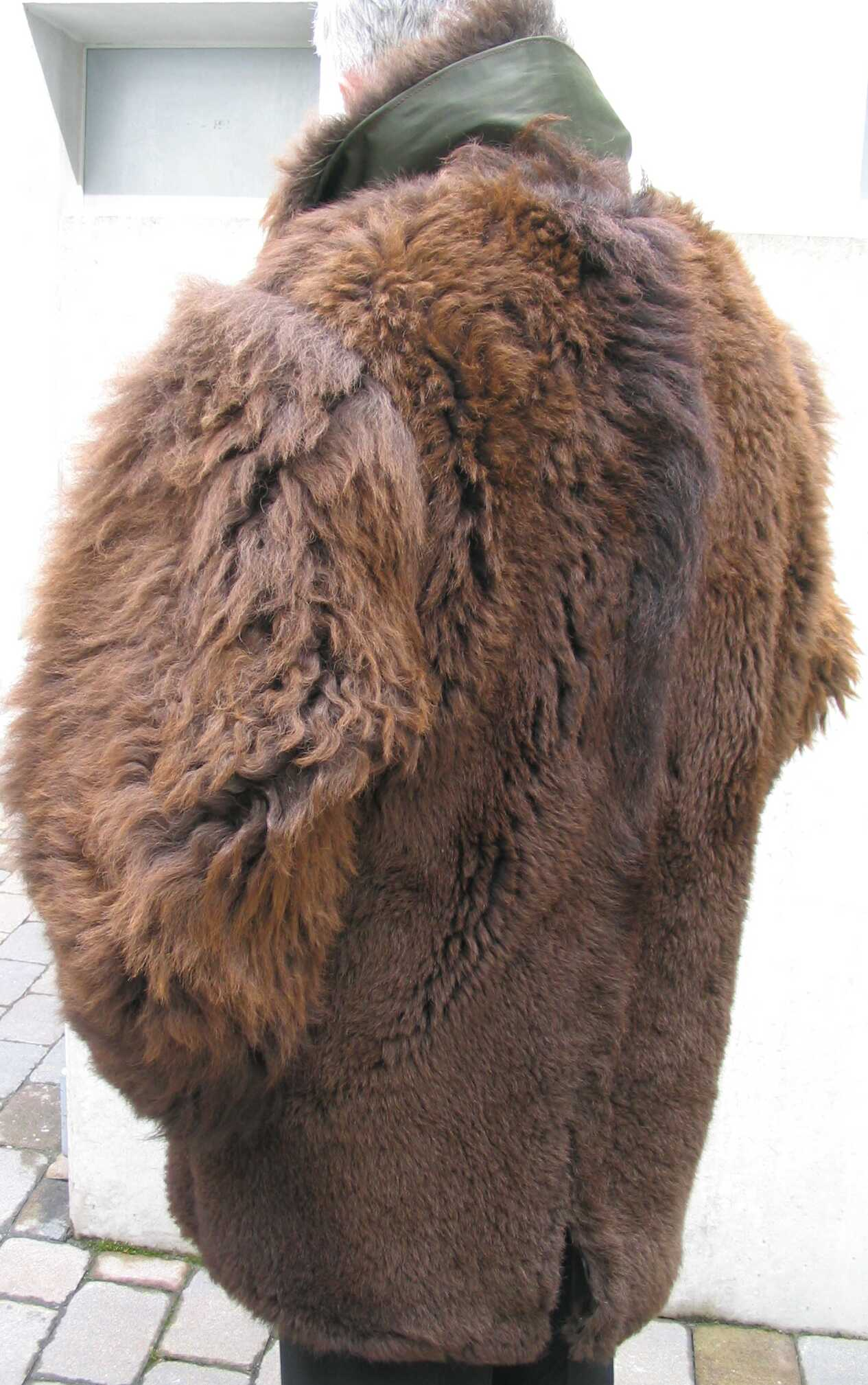 Bison jacket / Bison-Herrenjacke. Gewicht 6,2 kg. Herkunft der Jacke Nordamerika, Grenze zu Kanada. Sehr wahrscheinlich zwischen 2000 und 2006, eventuell früher.